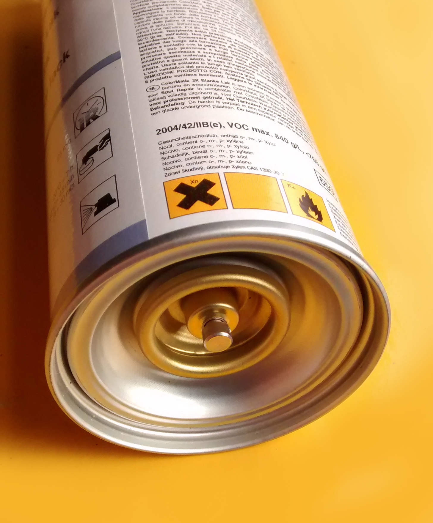 2K-Lack Spray Dosenboden Klarlack mit Härter